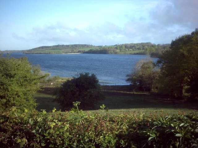 de burgo